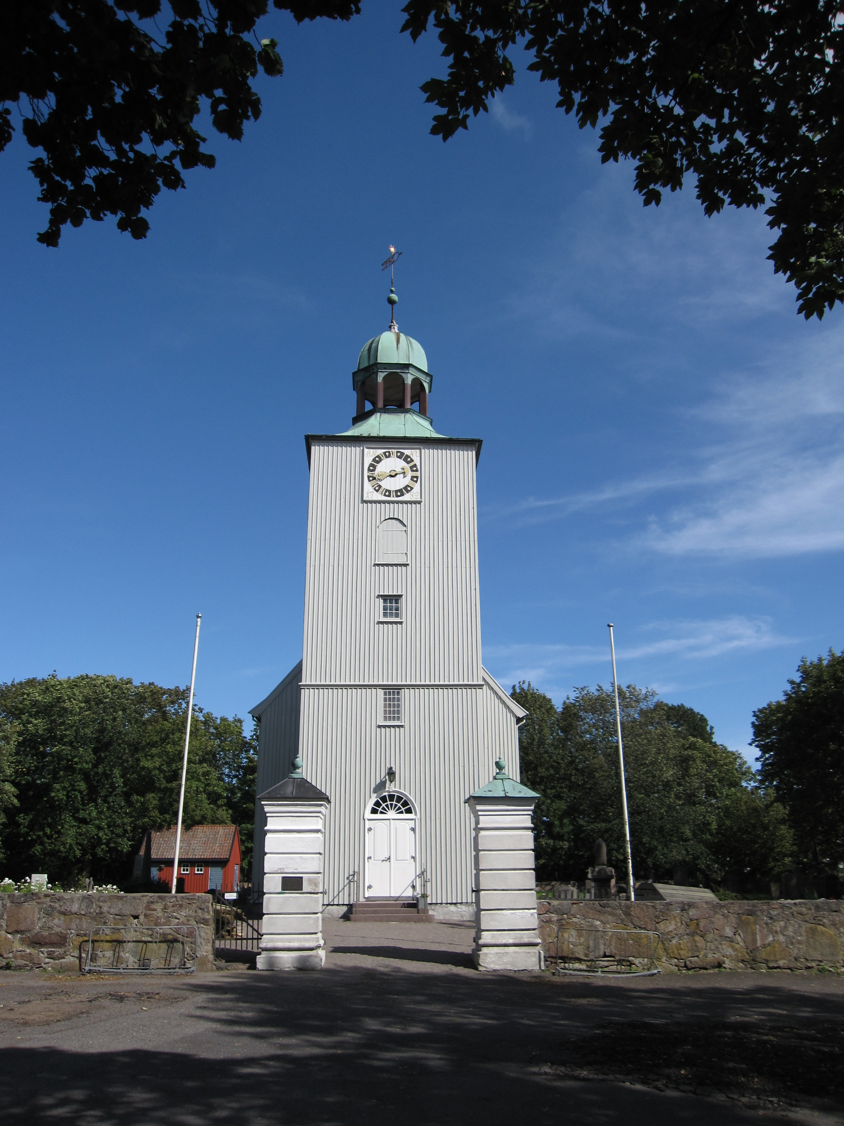 Vallø kirke er en langkirke i tre fra 1782 på Vallø utenfor Tønsberg.